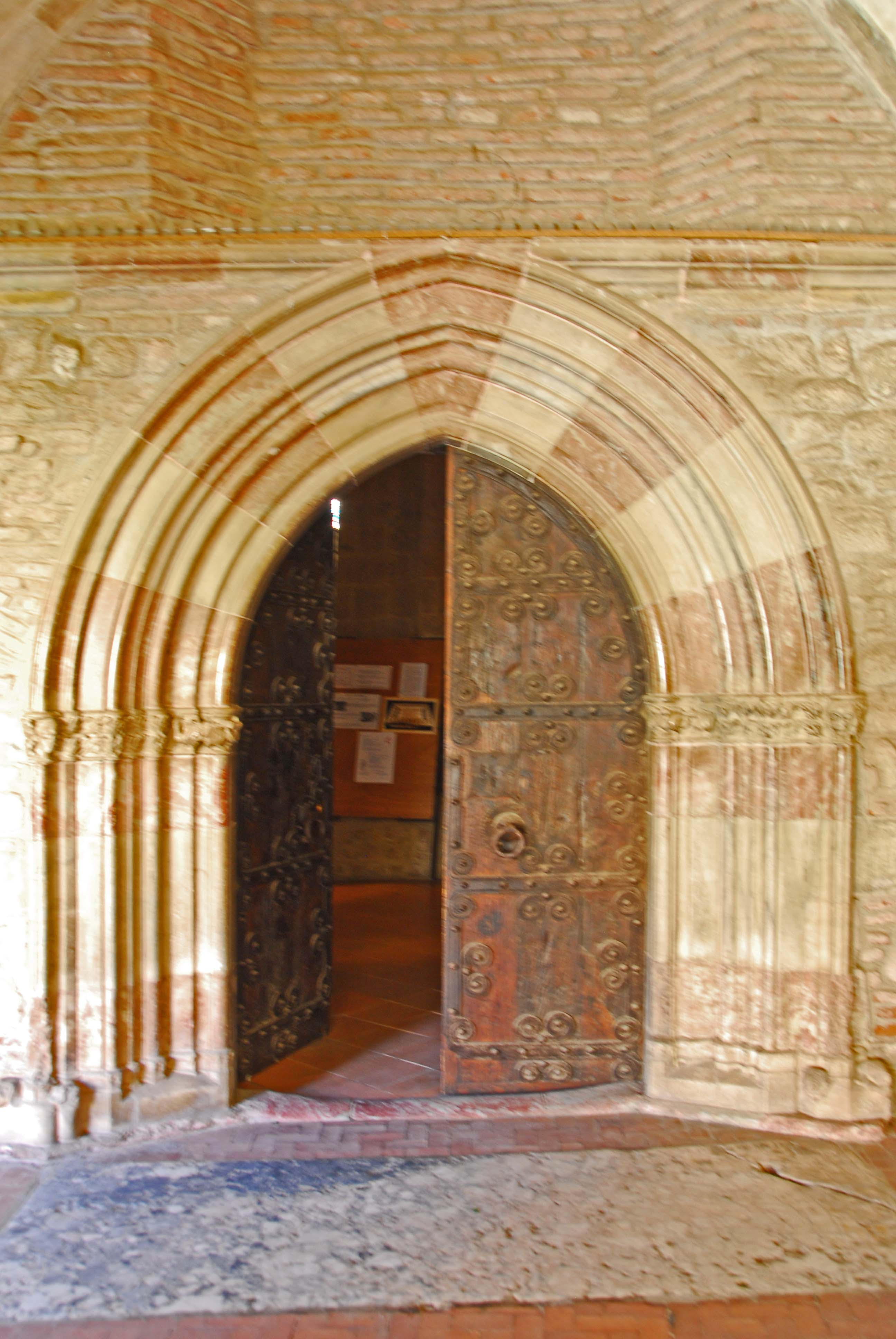 Ste-Eulalie-et-Ste-Julie_d’Elne, Südgalierie, Portal zur Kirche